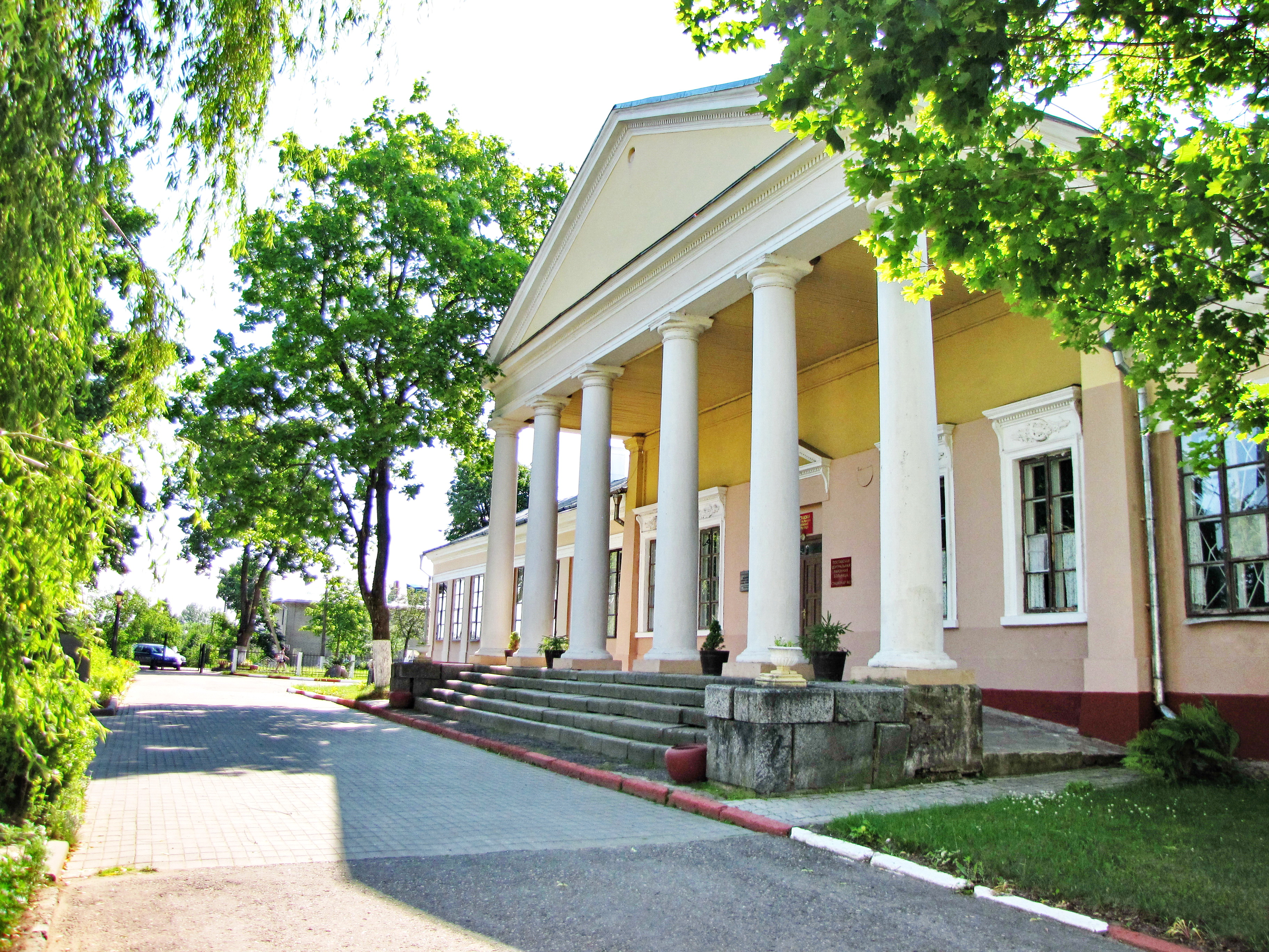 Беларуская (тарашкевіца): Будынак былога палаца Тызэнгаўзаў. г. Паставы